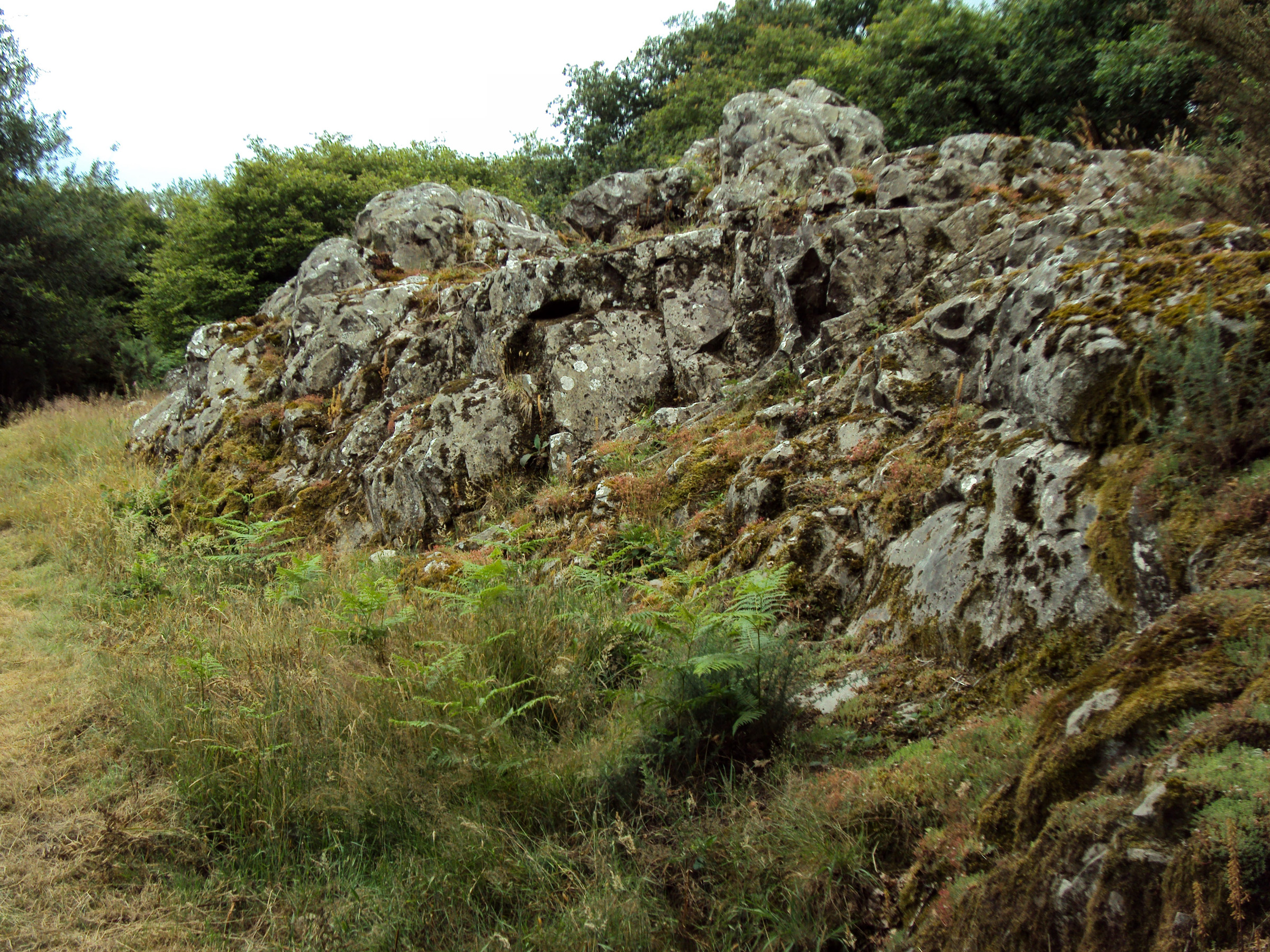 The site Quelfennec near Plussulien - Neolithic stone quarry - Côte d'Armor (22) - We can discern the remnant of the workshop extraction of dolerite used for making polished axes - July 2011 - Photo 02 Ænglisc: Le site de Quelfennec à Plussulien - Carrière de pierre néolithique - Côte d'Armor (22) - On discerne encore les traces de l'extraction de la pierre de dolérite servant à l aconfection des hâches polies - Juillet 2011 - Photo 02